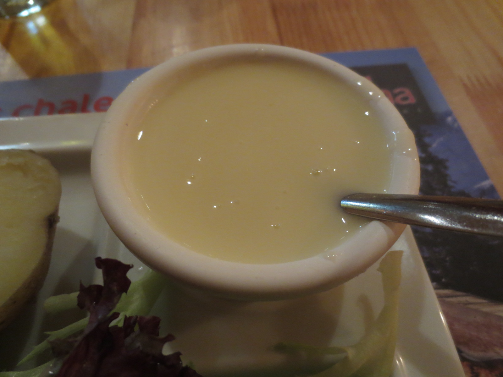 Cancoillotte